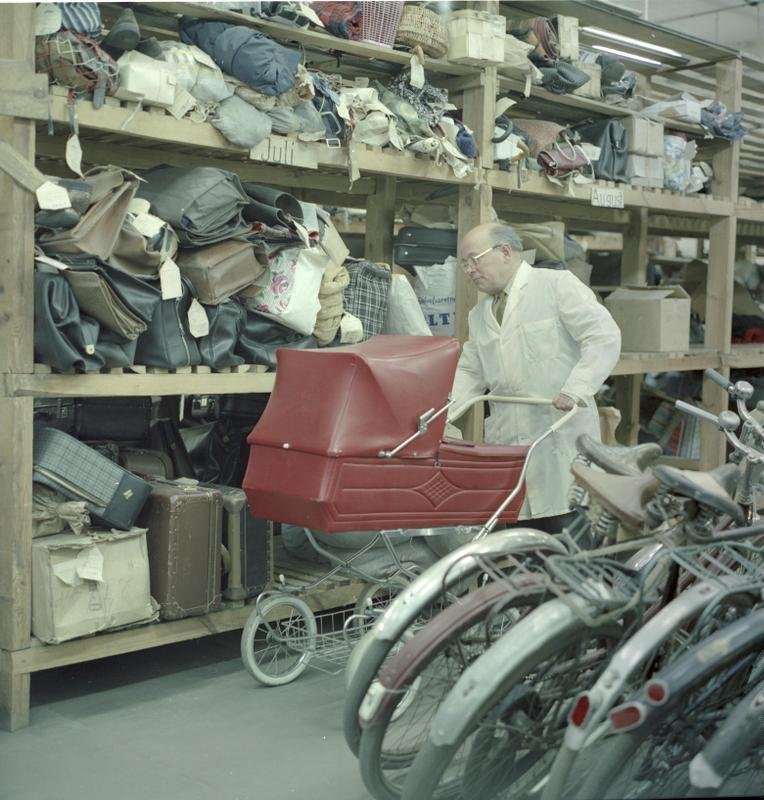 ADN-ZB Franke 25.1.73 Berlin: Fundbüro Vom Schaukelpferd über Fahrräder, Koffer, Taschen bis zum Staubwedel reichen die Gegenstände, die von vergesslichen Reisenden in den Verkehrsmitteln bzw. auf Bahnhöfen liegengelassen oder verloren werden. Der Leiter des Fundbüros Reichsbahnhauptsekretär Fritz Alisch präsentiert hier einen der letzten Funde: ein fast neuer Kinderwagen mit Kissen und Decken.